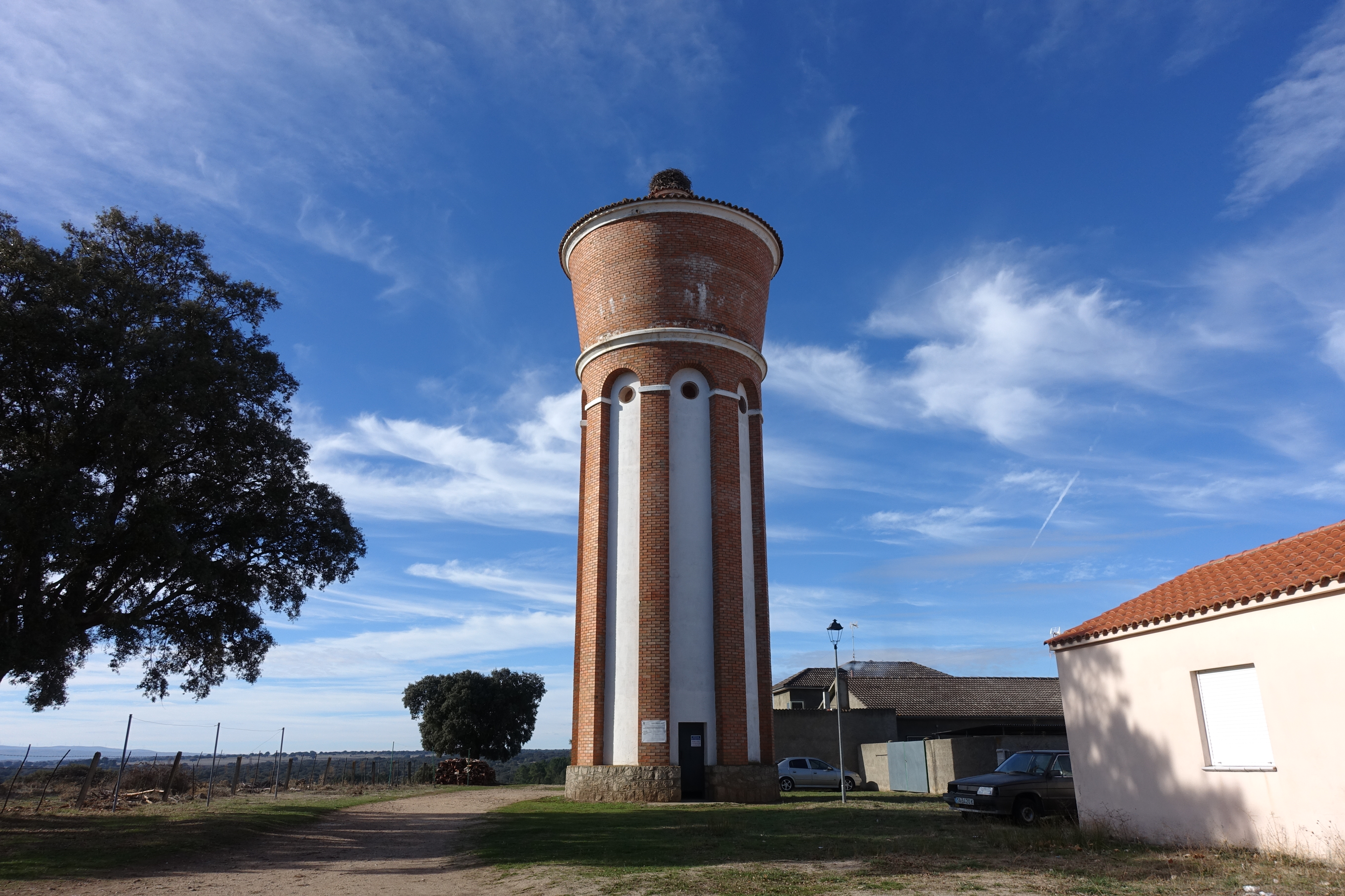 Depósito de agua en Campillo de Azaba (Salamanca, España).